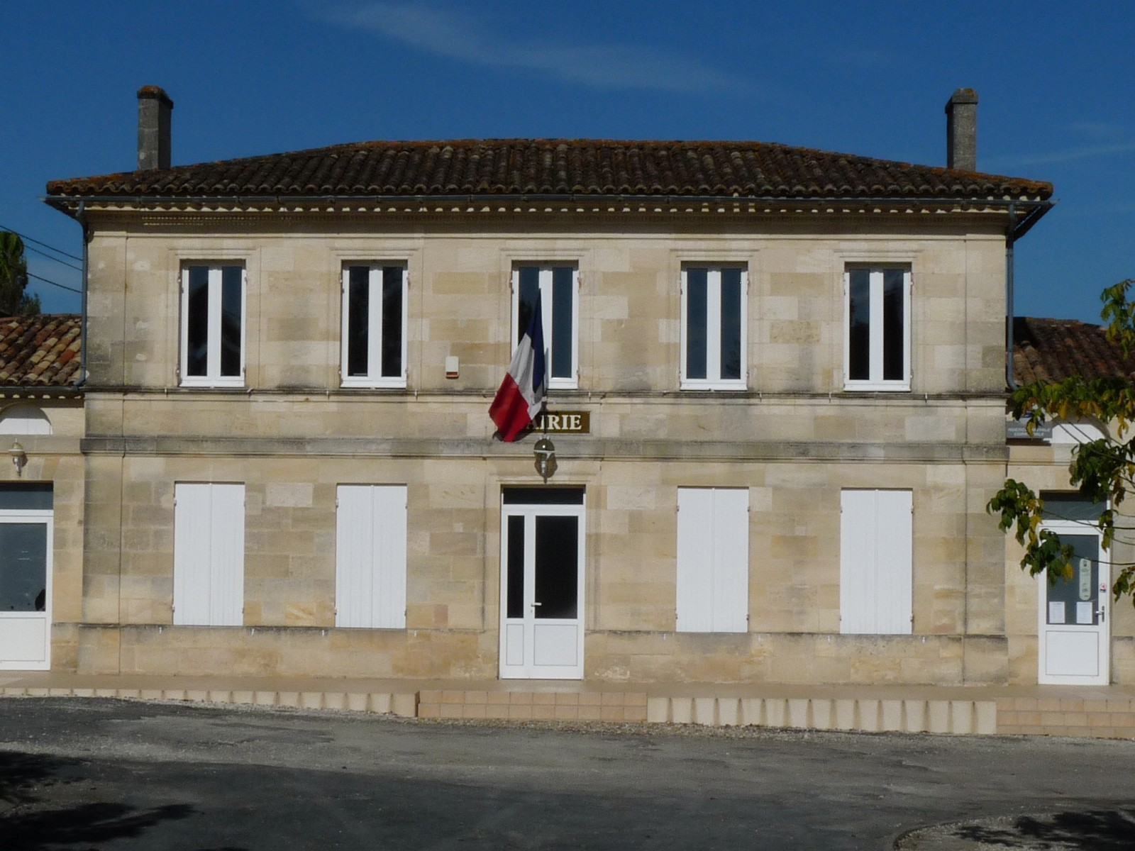 Mairie de Teuillac, Gironde, France